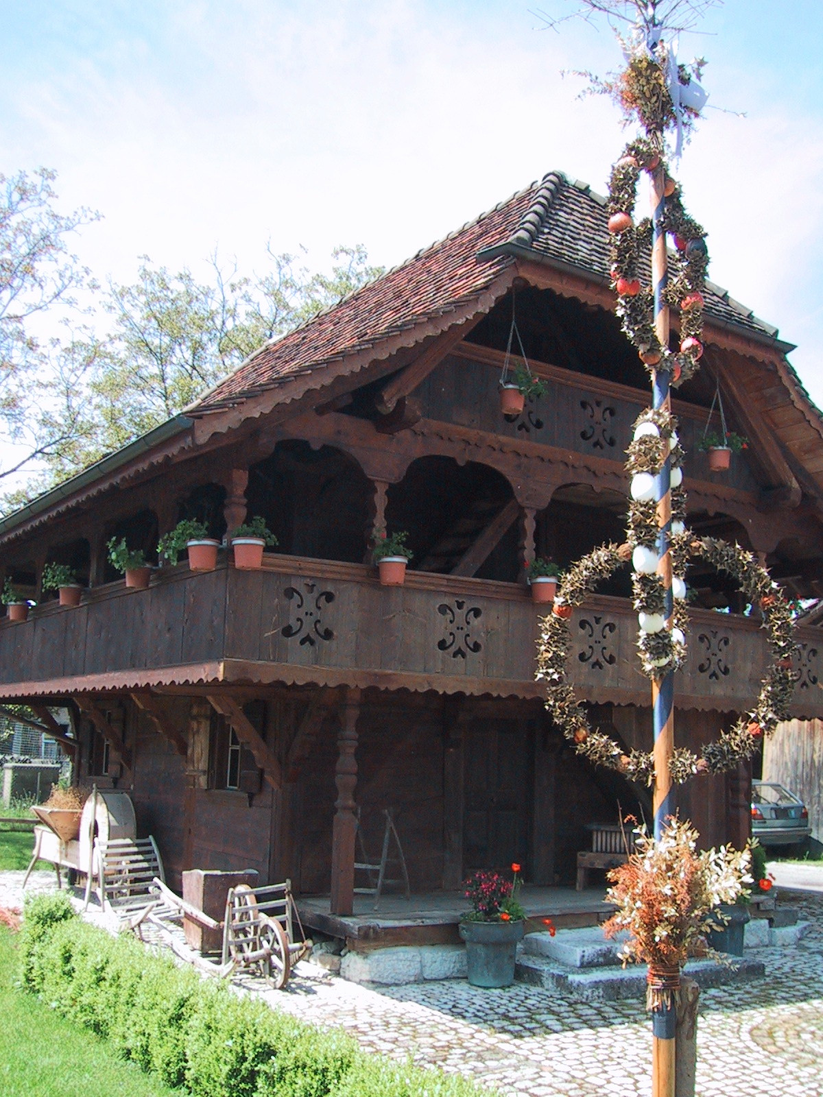 Aufnahme 20. Mai 2005, altes Gebäude in Gunzgen an der Hauptstrasse. Fotograf Peter Berger (selbst fotografiert). Lizenzstatus "GNU-FDL"